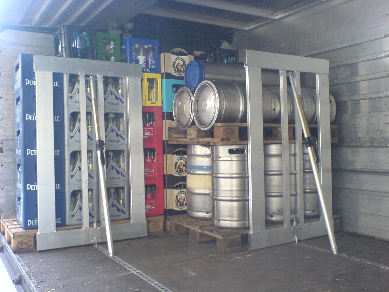 Verankerte Sperrstangen in einem LKW-Laderaum (Getränketransport).